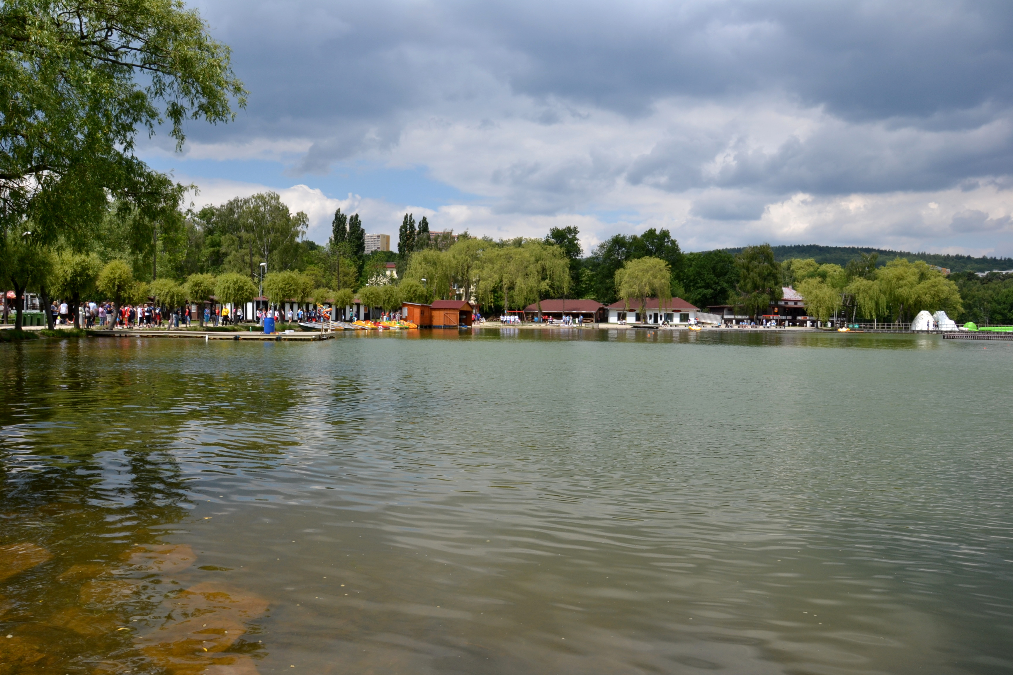 Západní břeh